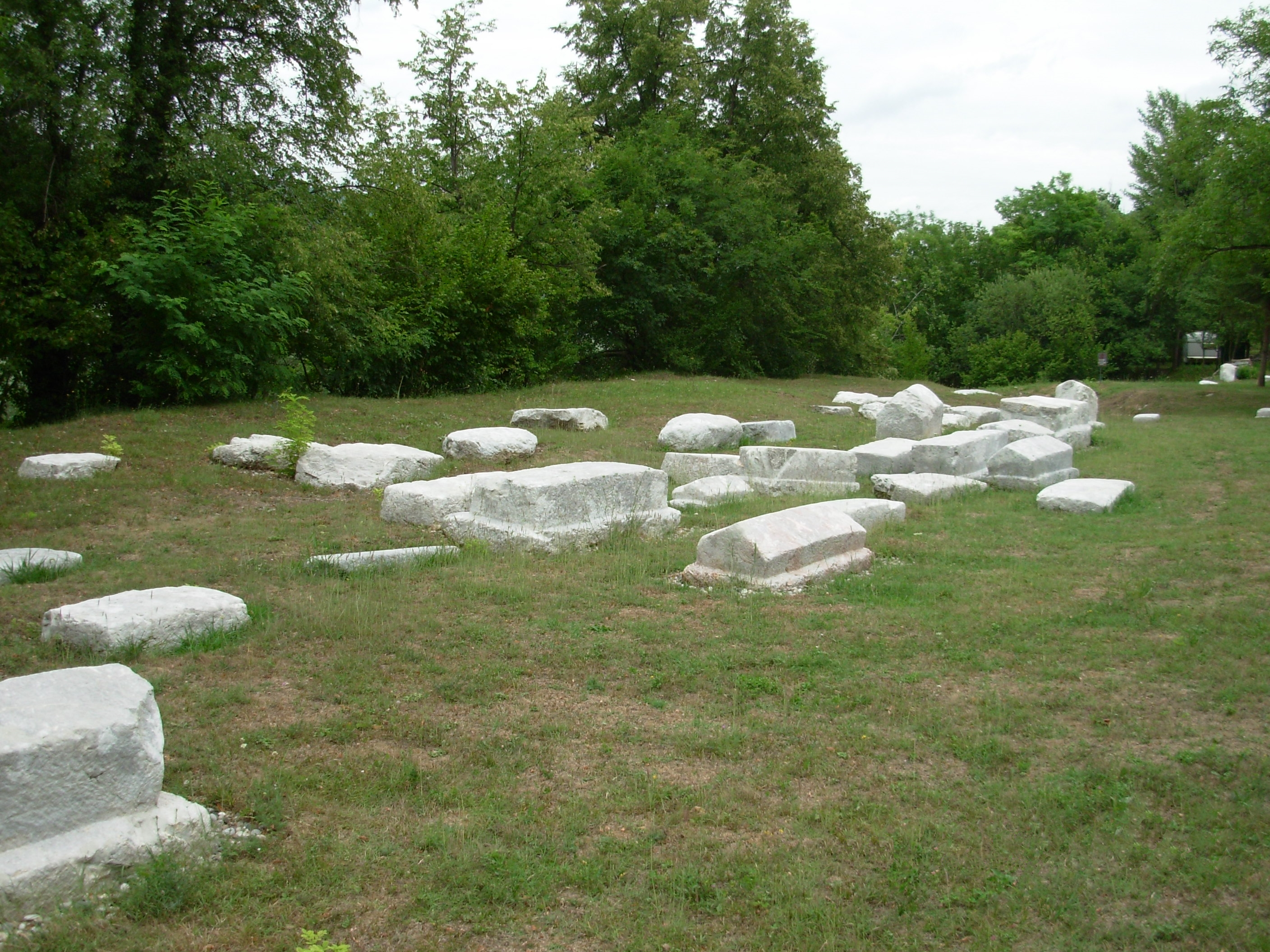 Mramorje, Perućac, Srbija. Slikao Goldfinger